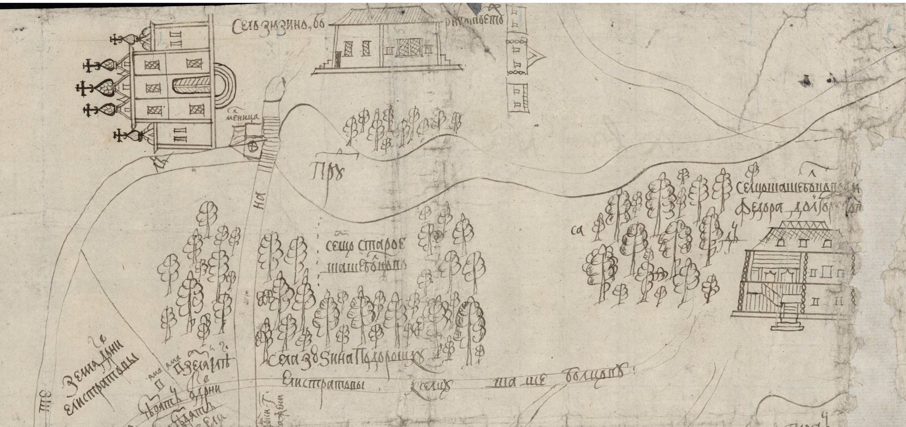 Зюзино и соседние объекты на карте 1694 года